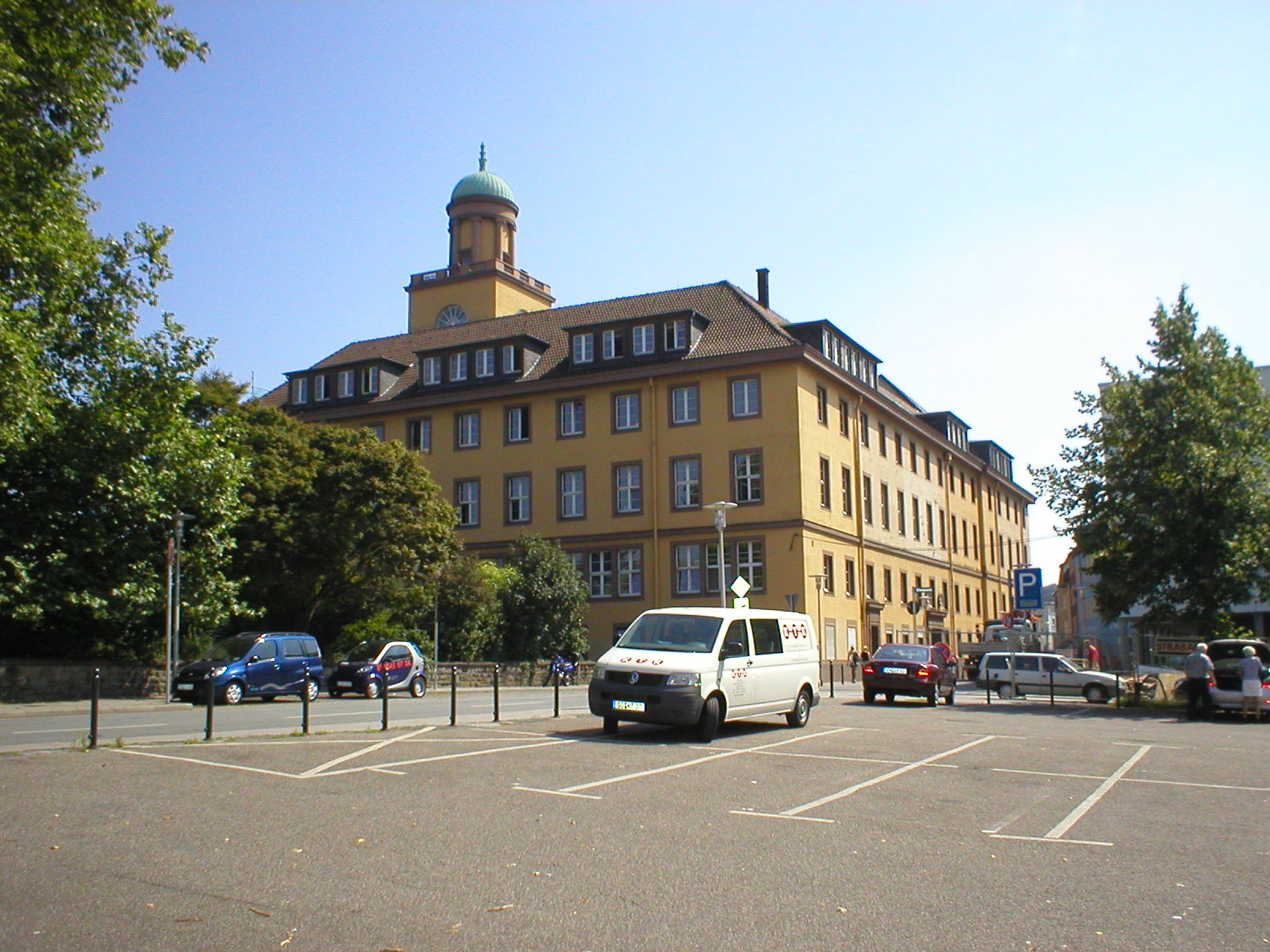 Rückseite des Rathauses von Witten